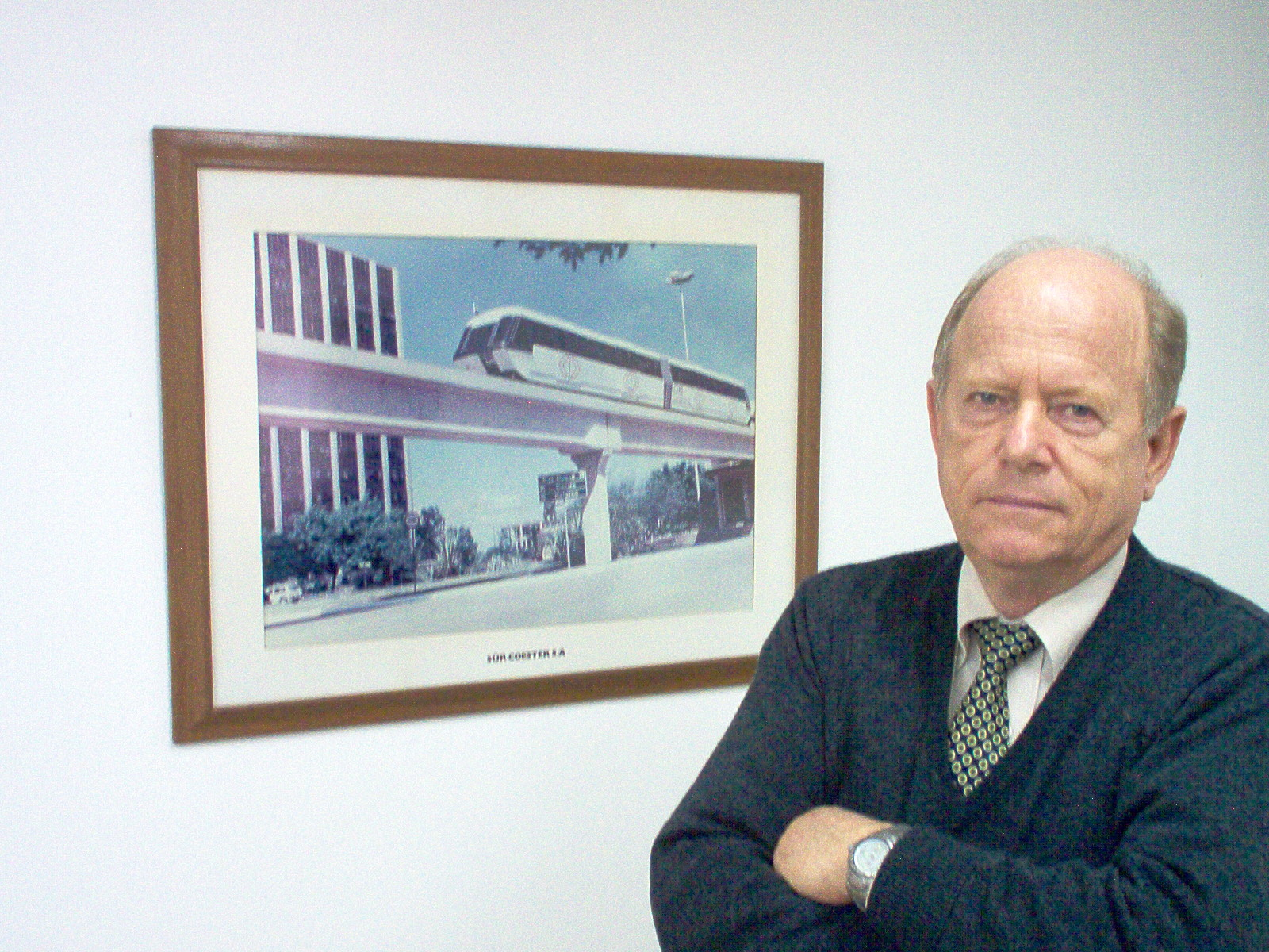 Oskar Coester